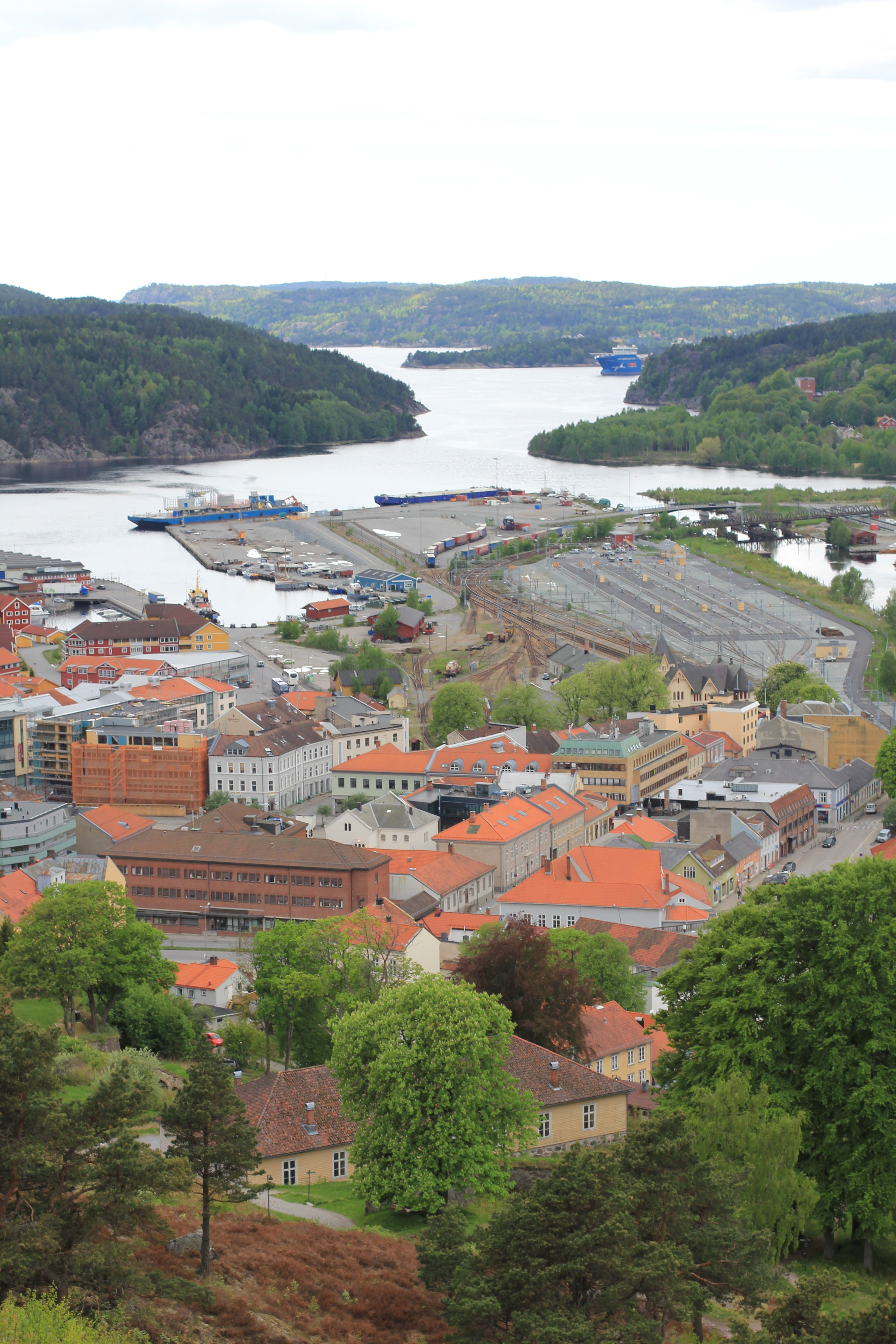 Halden havn.